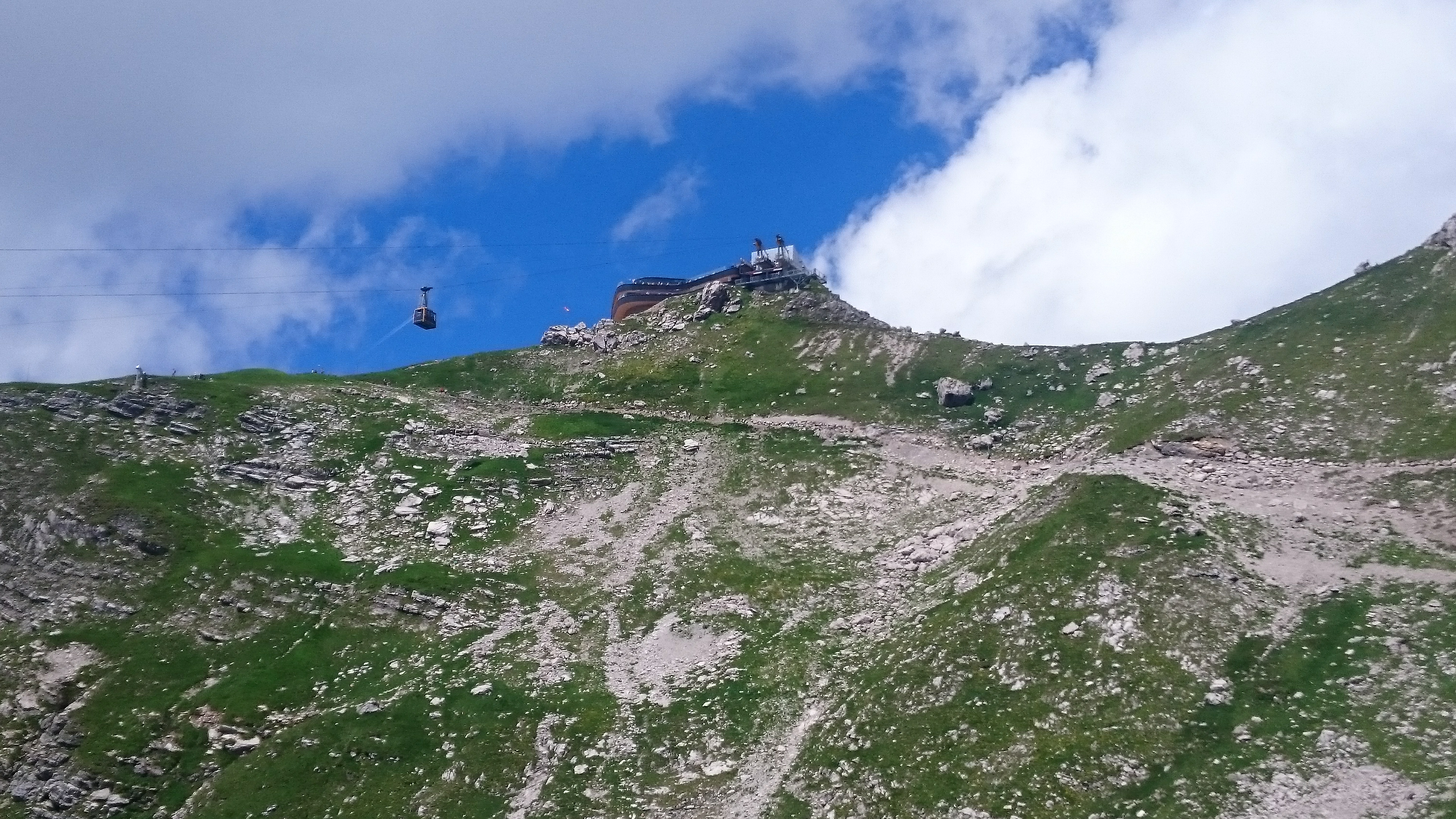 neues Gipfelgebäude